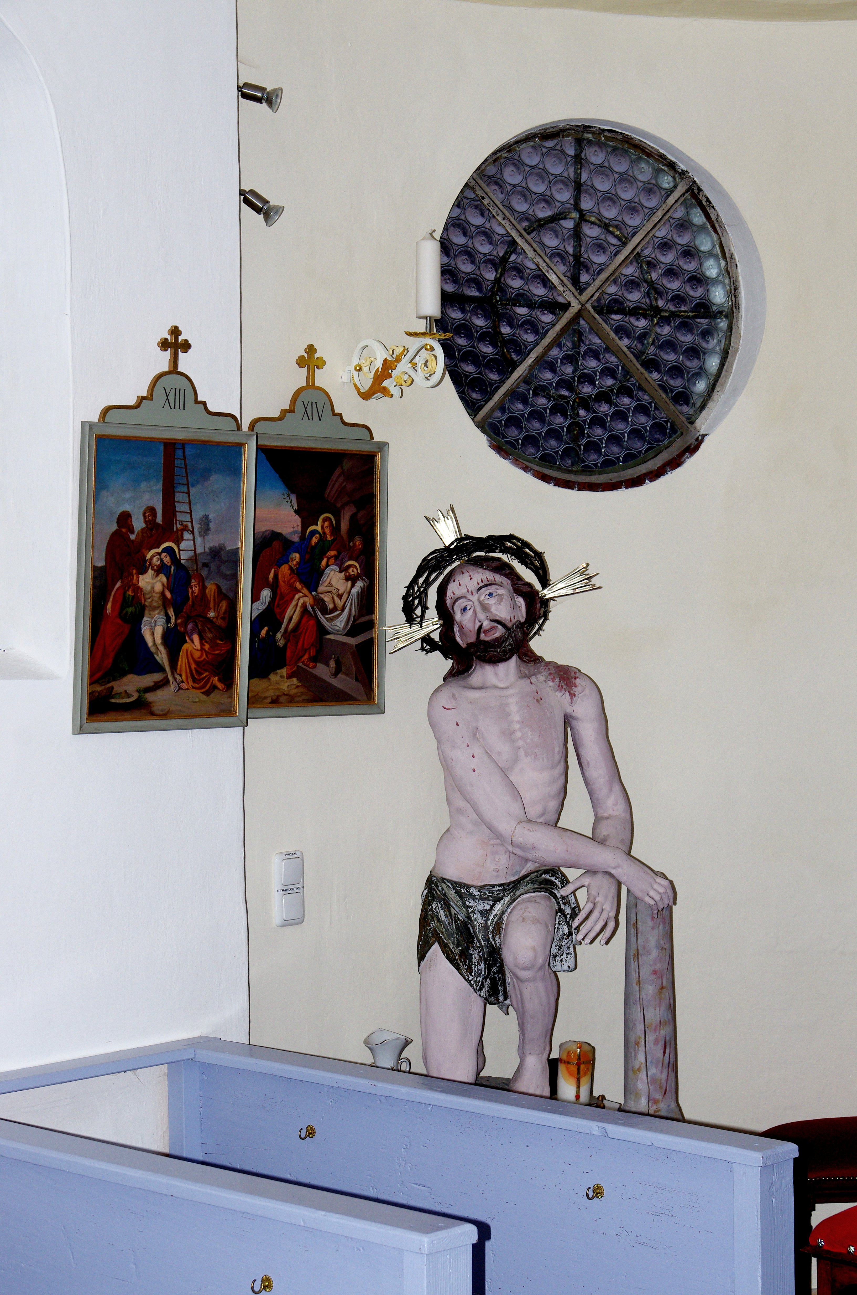 Die Kapelle St. Martin auch zum gegeißelten Heiland